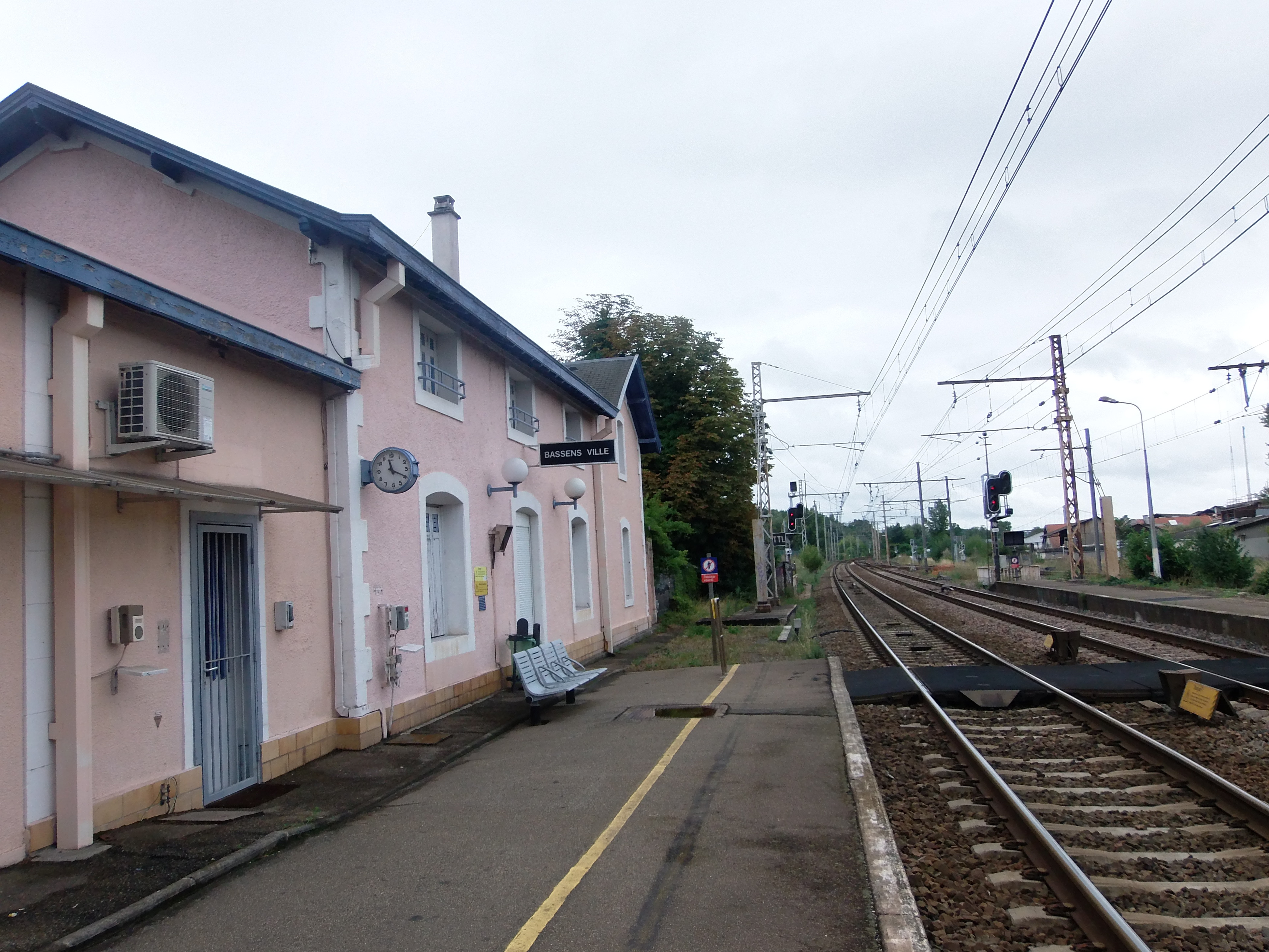 Gare de Bassens (Gironde, France), gare ferroviaire française de la ligne de Paris-Austerlitz à Bordeaux-Saint-Jean.